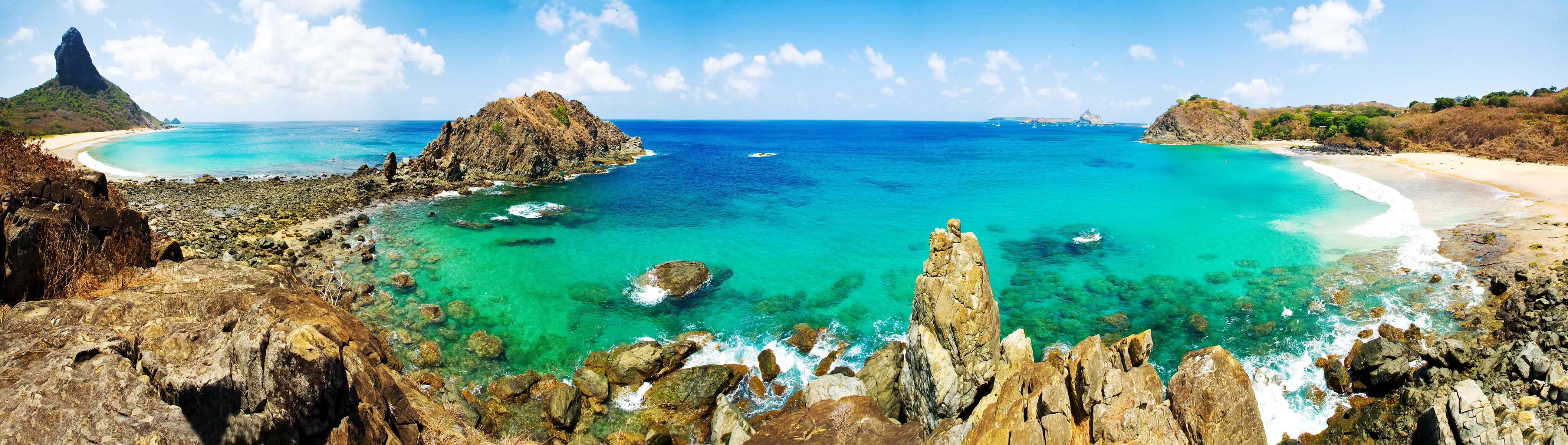 Praia do Cachorro